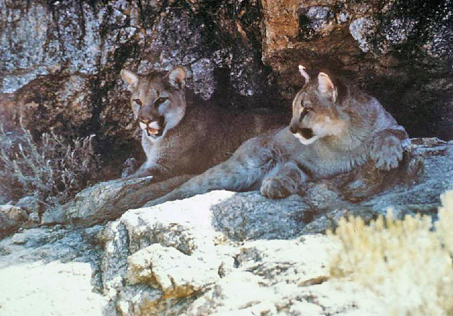 Puma-Paar